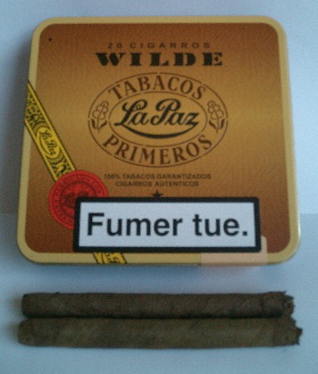 Boite de cigares la Paz avec deux exemplaires dessous (en France)